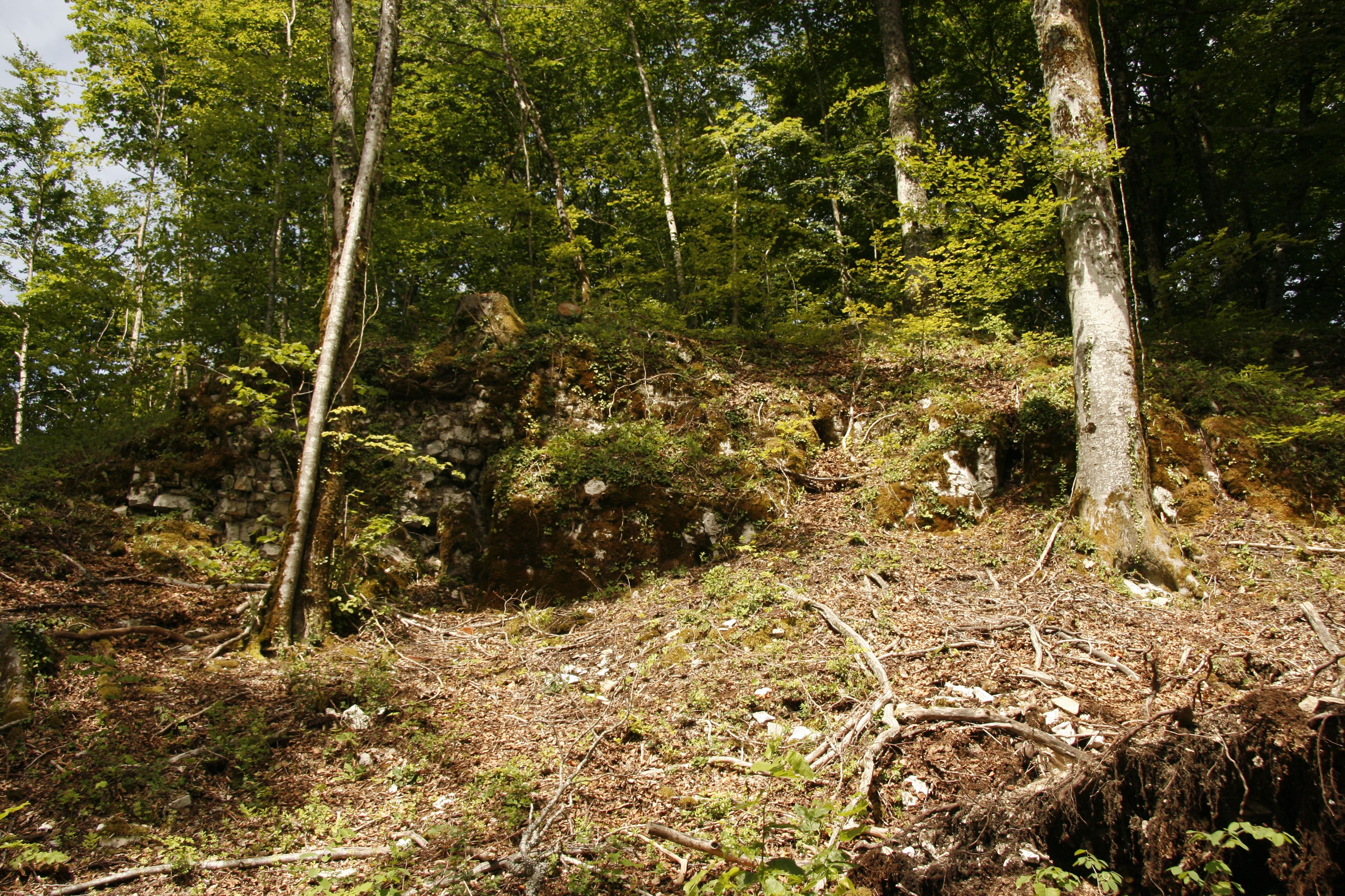 Chateau de Rougemont Facade nord